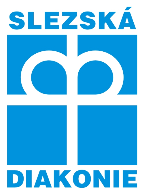 Logo Slezské diakonie